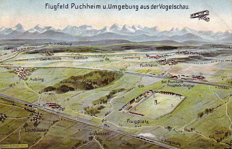 Ansichtskarte vom ersten Flughafen Bayerns in Puchheim 1910-1914.